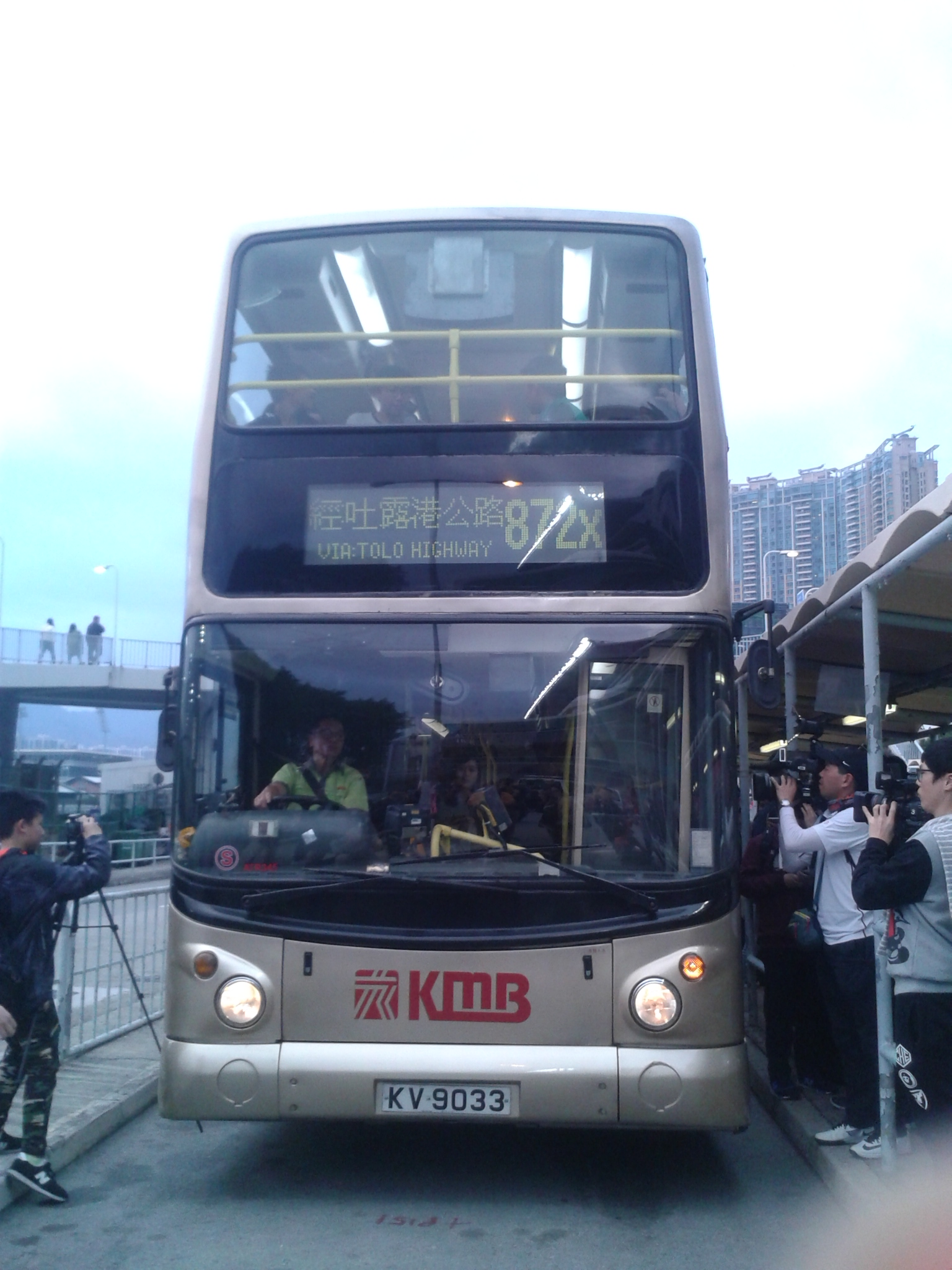 中文（香港）: 於大埔公路雙層巴士翻側事故後，九巴加開872X線特快班次，標榜行走吐露港公路。圖為該線投入服務當日的第一班車，吸引電視台作採訪。